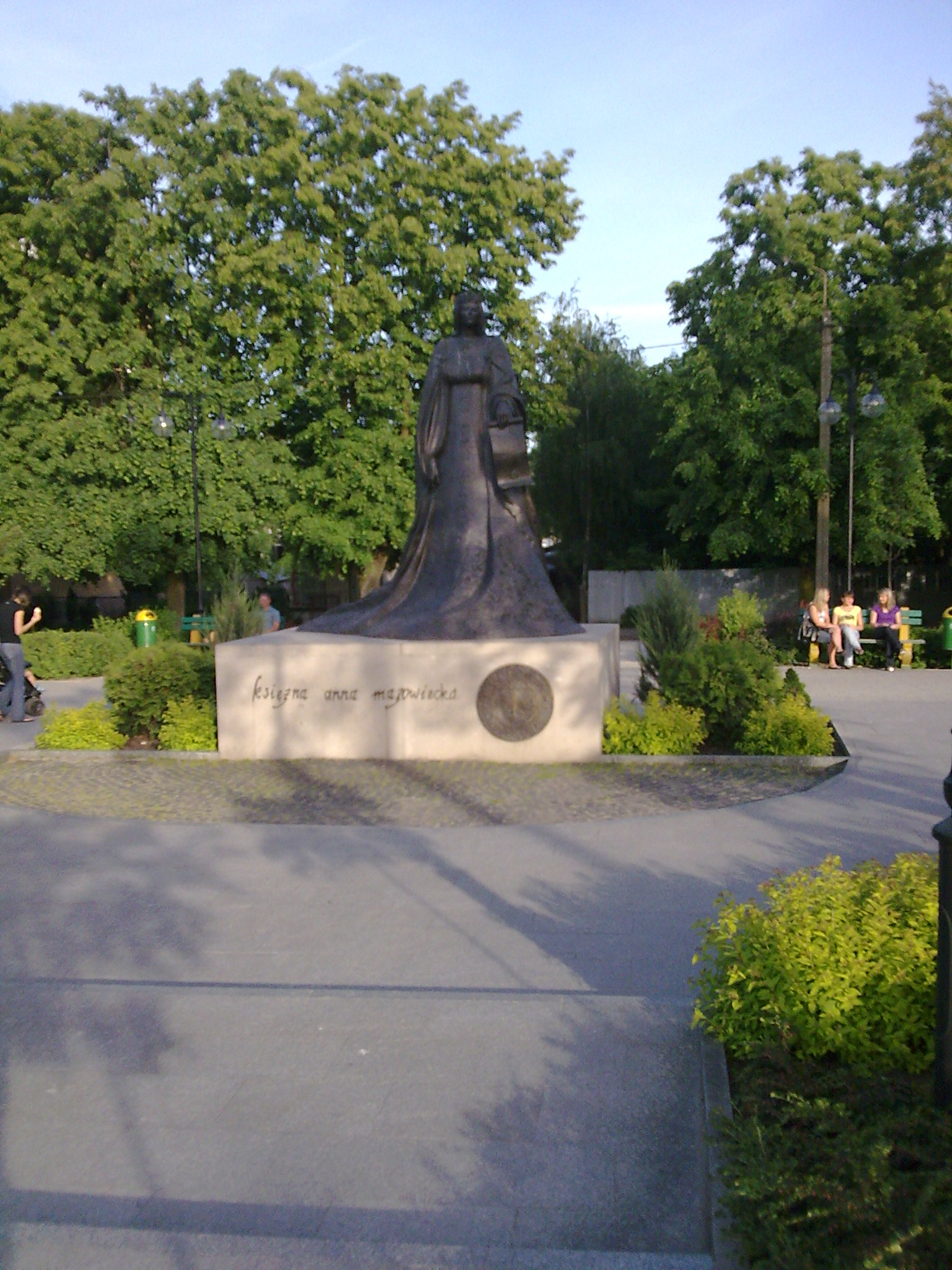 Pomnik księżnej mazowieckiej Anny Radziwiłłówny w Ostrowi Mazowieckiej[1]